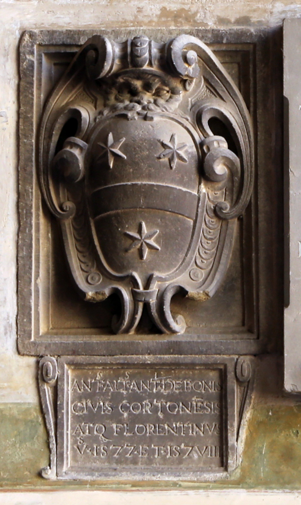 Palazzo dei Vicari This is a photo of a monument which is part of cultural heritage of Italy.